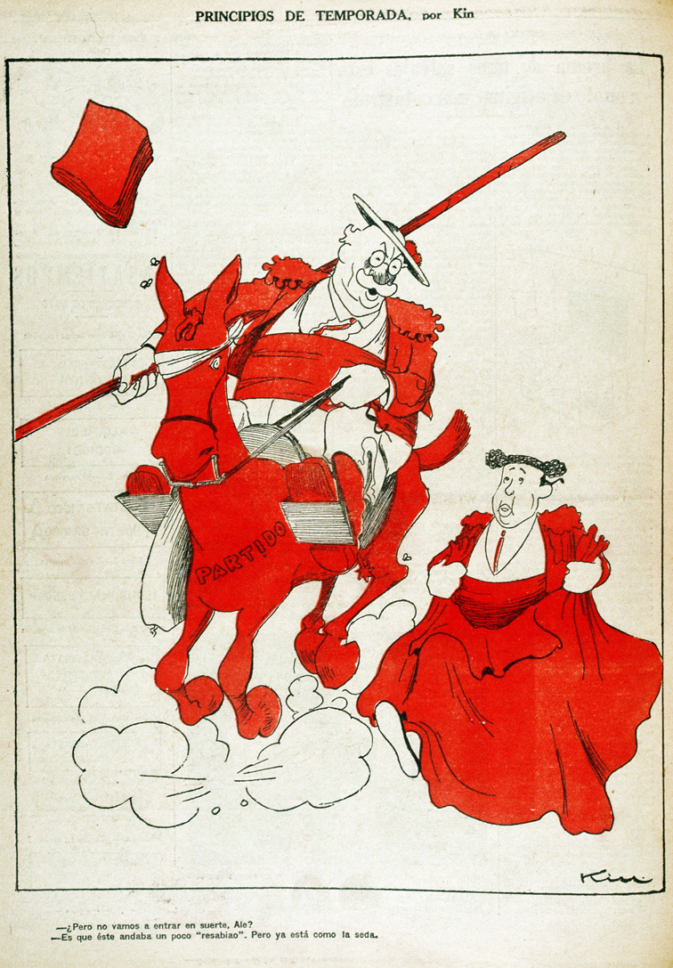 Joaquín de Alba, Kin, en Gracia y Justicia: Gil Robles y Lerroux, primer espada y picador respectivamente, salen al ruedo político tras período de ausencia.